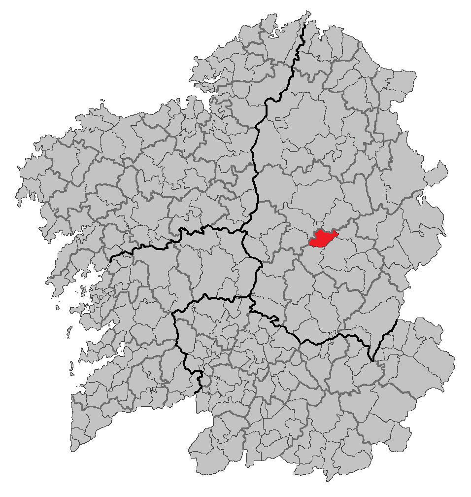 Mapa coa localización do concello de O Páramo.